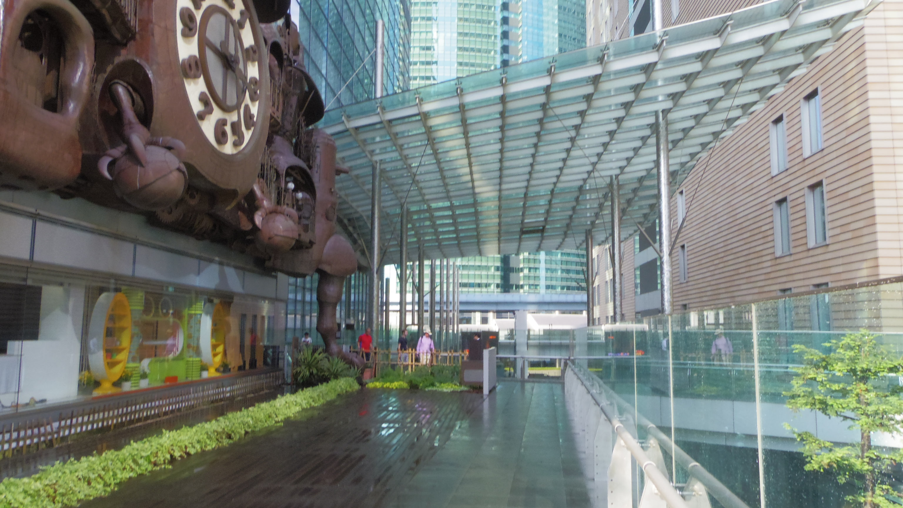 日本テレビ「マイスタジオ」（2015年9月撮影）。